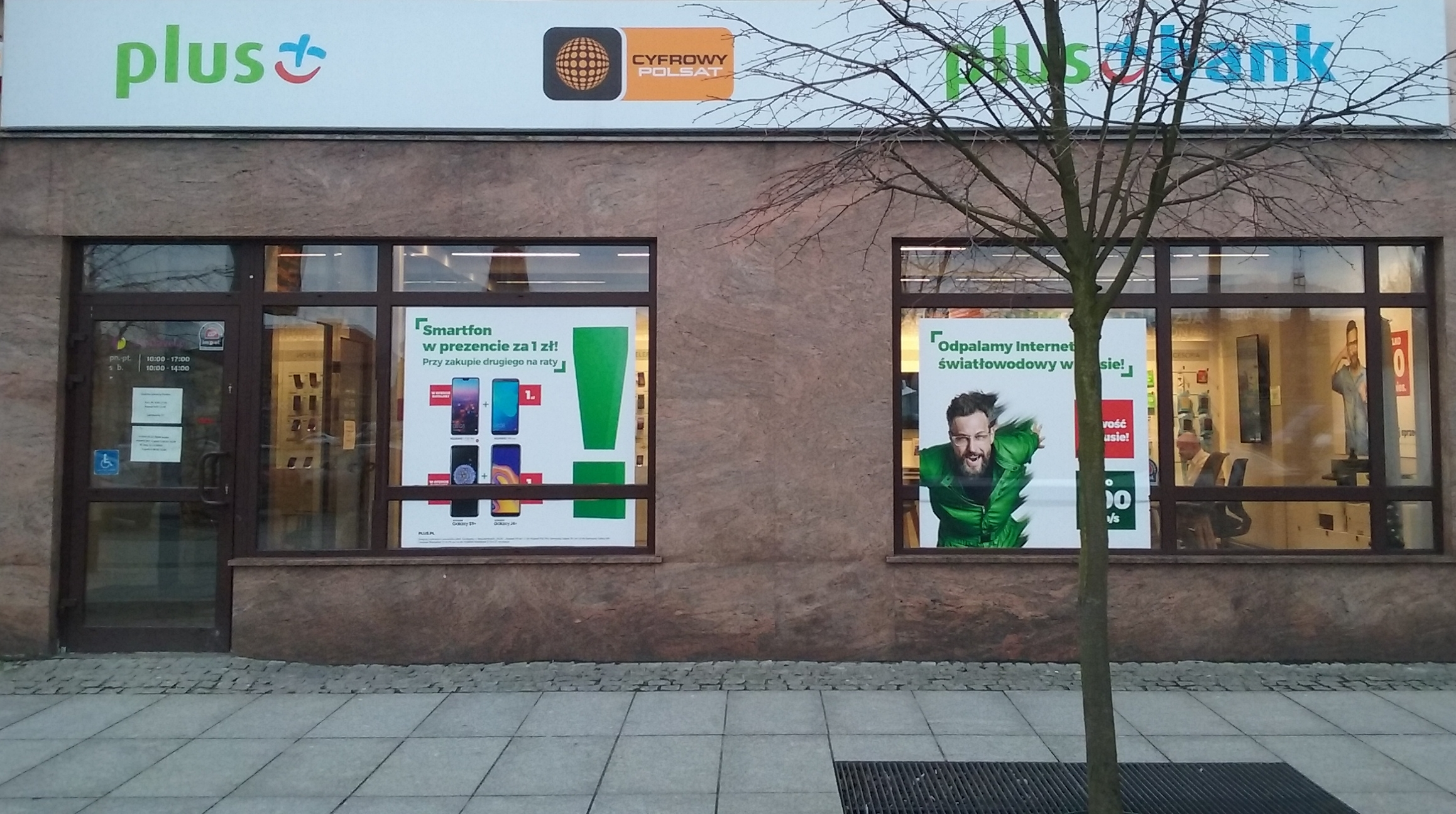 Odział operator telefoni komórkowej Plus i Cifrowy Polsat. Odział Plus Banku w 60-tysięcznym Tomaszowie Mazowieckim w województiwie łódzkim